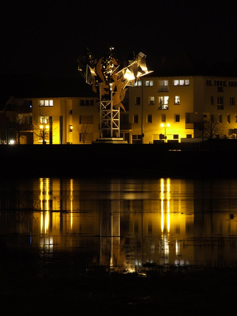 Die schönebecker Salzblume bei Nacht. Sonstiges: Fotografiert mit Fuji FinePix S9500.